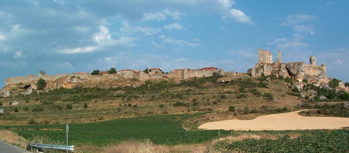 Calatañazor-Conjunto La imagen es mía y la protejo bajo GFDL Categoría:España (imagen)